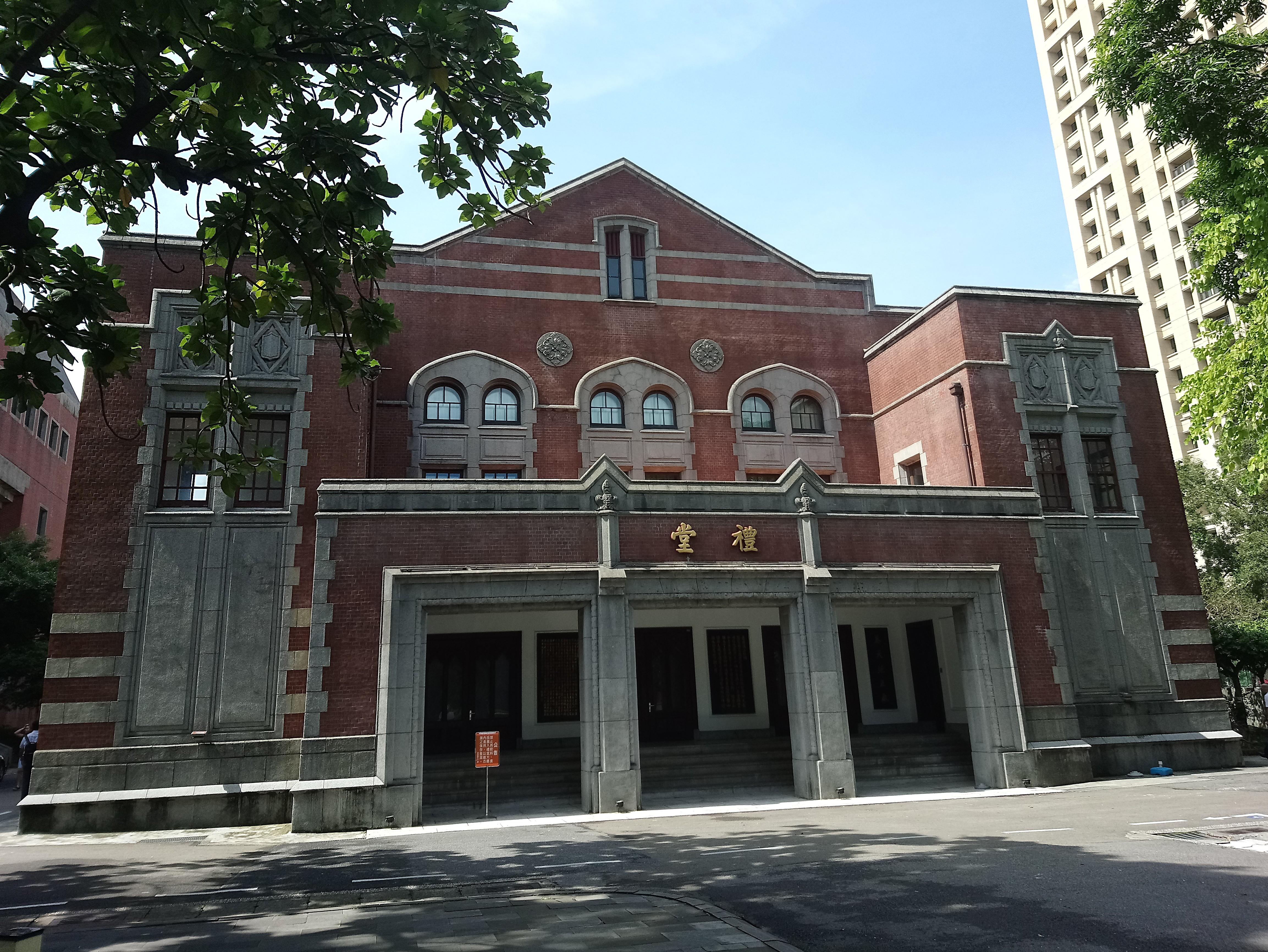 臺灣總督府臺北高等學校講堂,臺北市大安區和平次分區古莊里